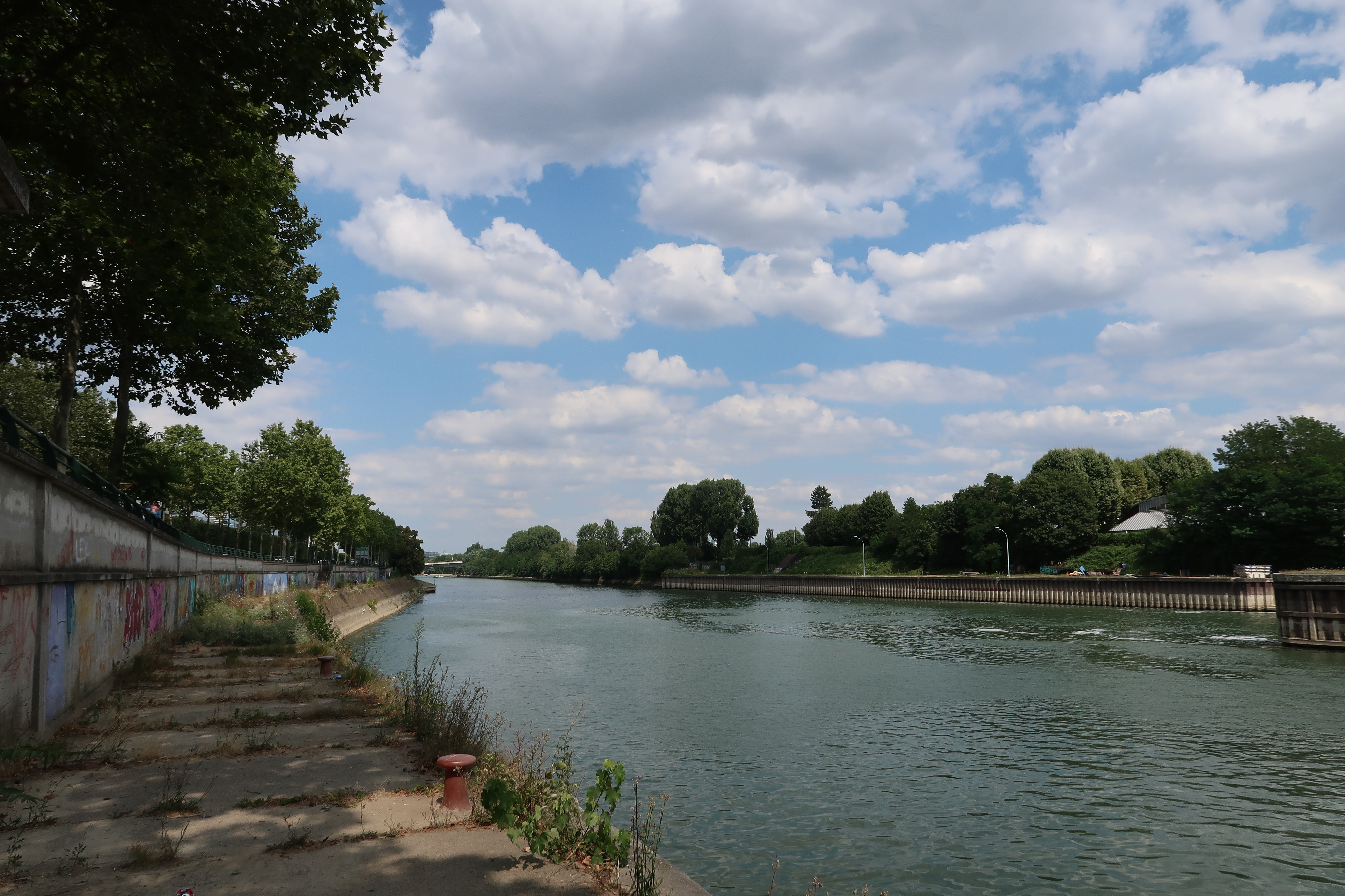 Quais de Suresnes (Hauts-de-Seine).